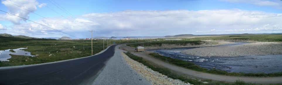 Territoire de Tasiujaq